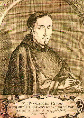 Der italienische Arzt, Botaniker und Franziskanermönch Francesco Cupani (* 21. Januar 1657 in Mirto; † 19. Januar 1710 in Palermo)